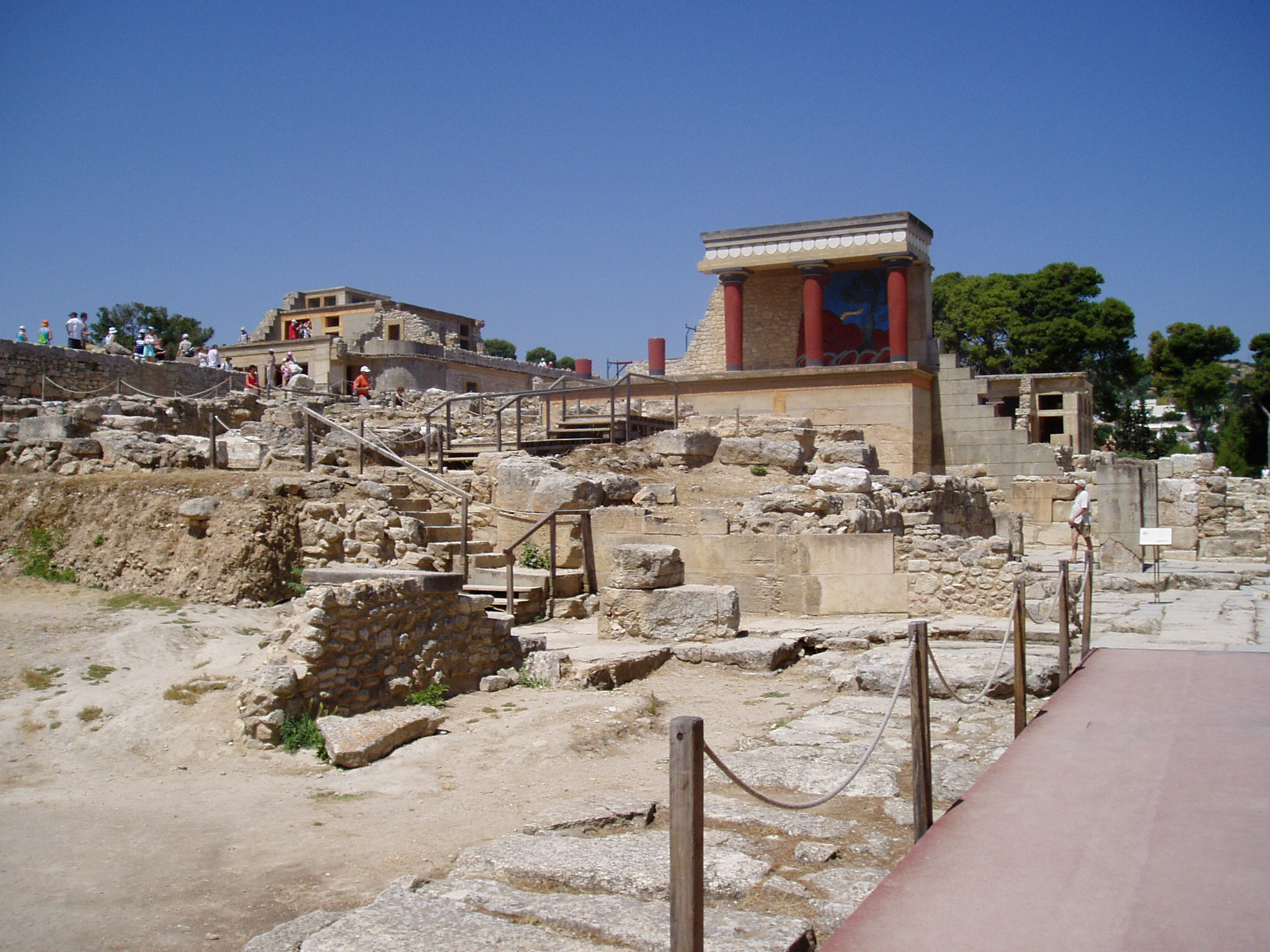 Tento obrázek je moje vlastní fotografie. Je na ní palác Knossos na Krétě